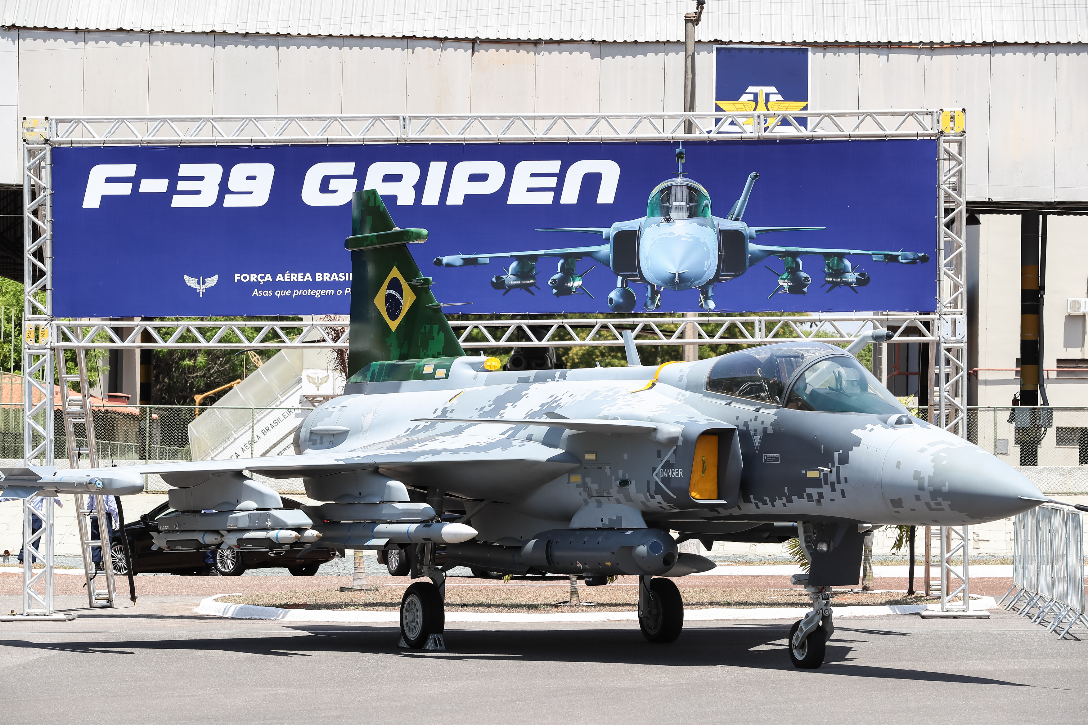 (Brasília - DF, 18/10/2019) Cerimônia em Comemoração ao dia do Aviador e ao dia da Força Aérea, com Imposição da Medalha da Ordem do Mérito Aeronáutico.Foto: Marcos Corrêa/PR